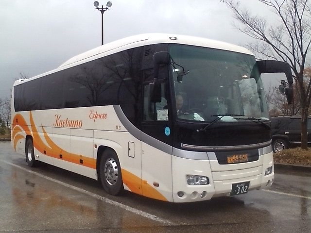 氷見・高岡－岐阜・名古屋線で使用される加越能鉄道の日野セレガ。城端サービスエリアで休憩中